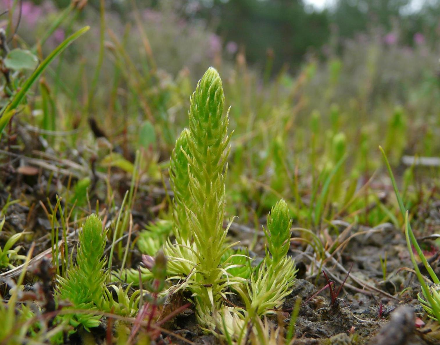 Lycopodiella inundata